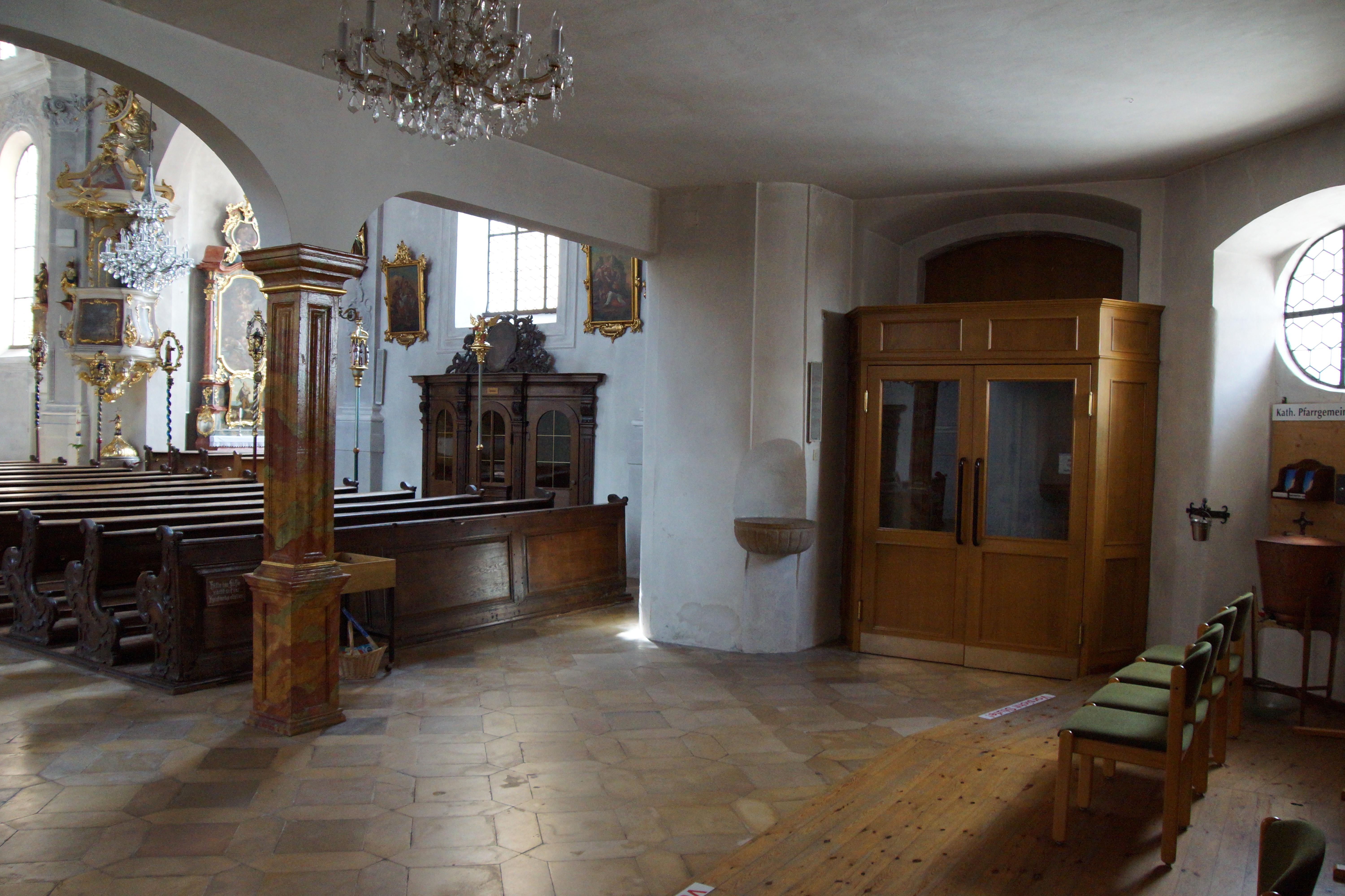 Die katholische Pfarrkirche Mariä Himmelfahrt in Berching in der Oberpfalz